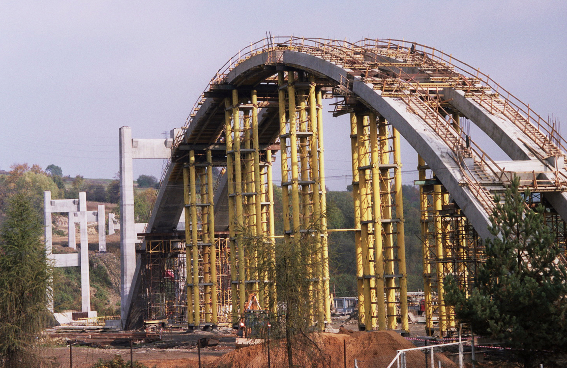 Budowa drogi ekspresowej S1 w miejscowości Milówka. Author: Przykuta Date: Octobr 2005